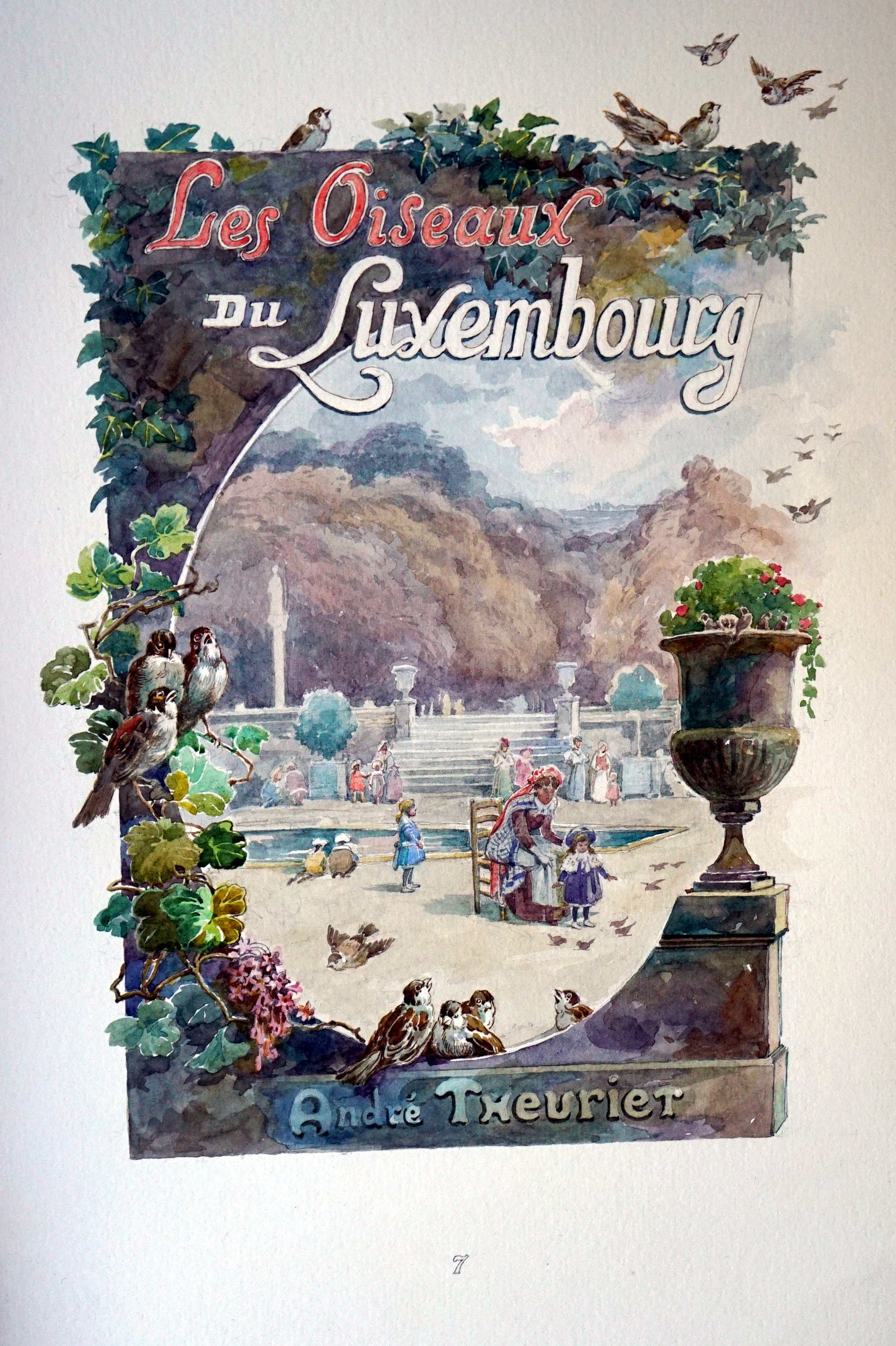 oeuvre calligraphiée et décorée par Auger pour Diancourt.